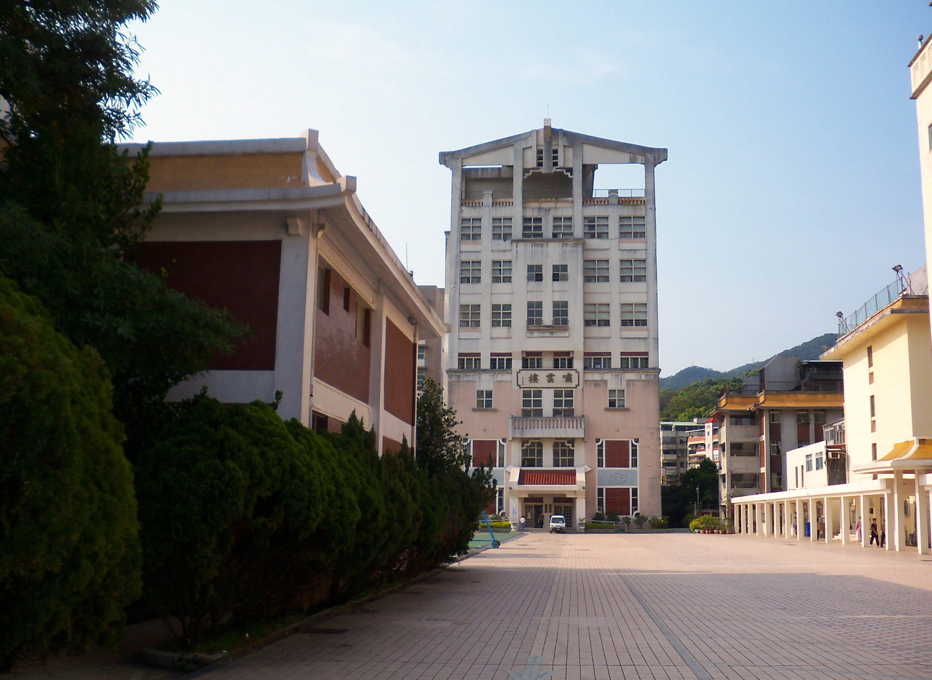 國立臺灣戲曲學院內湖校區主通道北望嘯雲樓前。